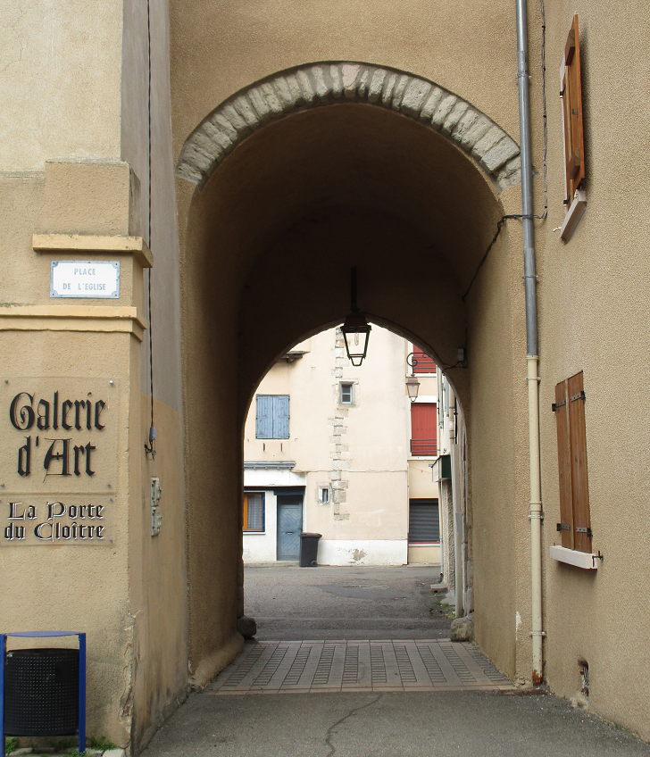 Porte du Cloître, médiévale, à Sury le Comtal